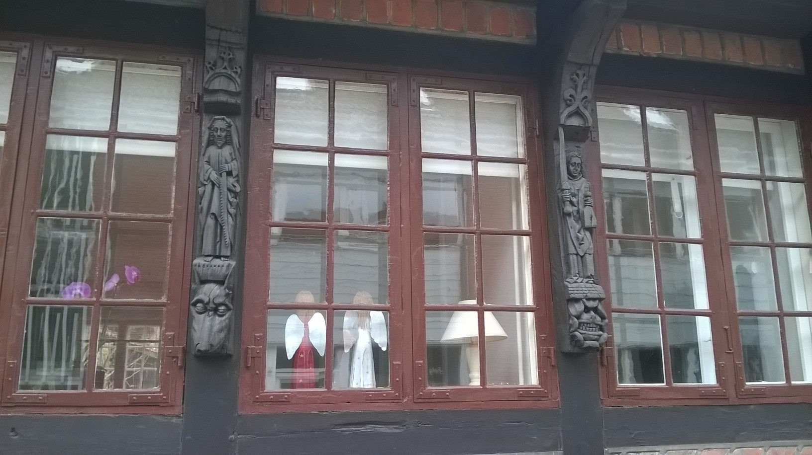 Apostle på Apostelhuset i Riddergade, Næstved.